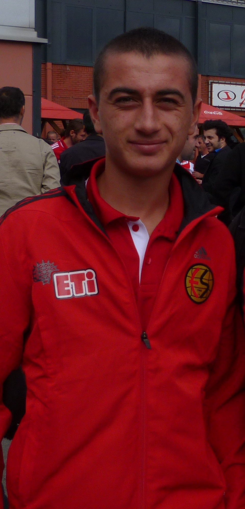 Aydin